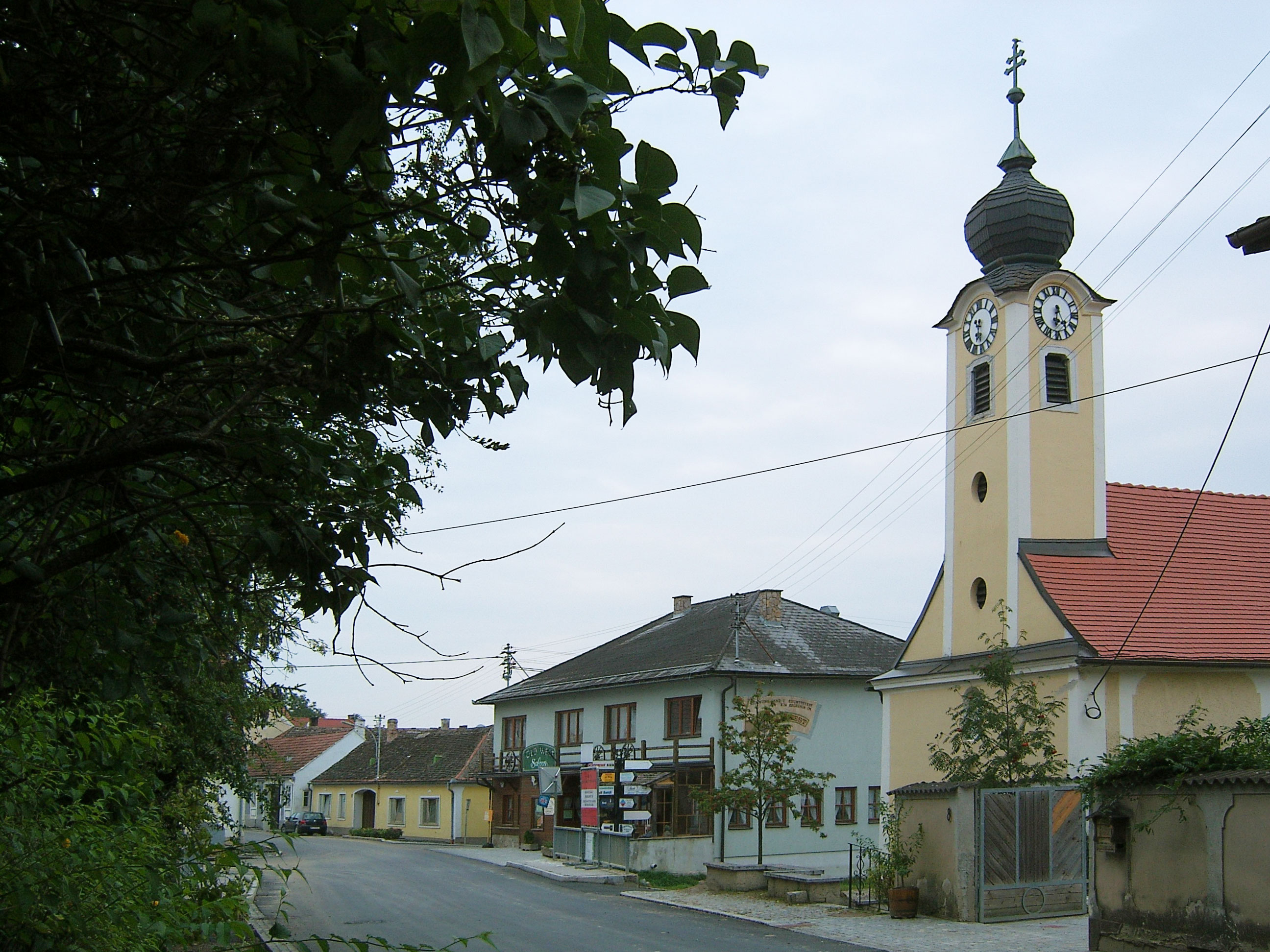 Ortskapelle Mariae Empfängnis Pfaffstettem Gemeinde Ravelsbach